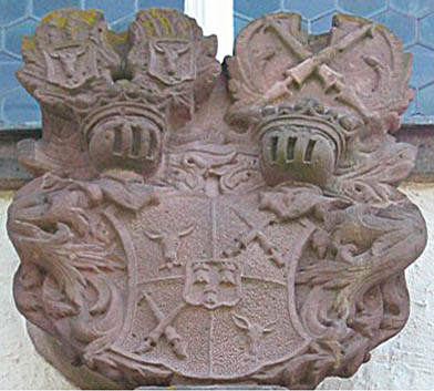 Das Wappen der Riedesel zu Eisenbach, Erbmarschälle von Hessen über der Landenhausener (Wartenberg) Kirchtür.